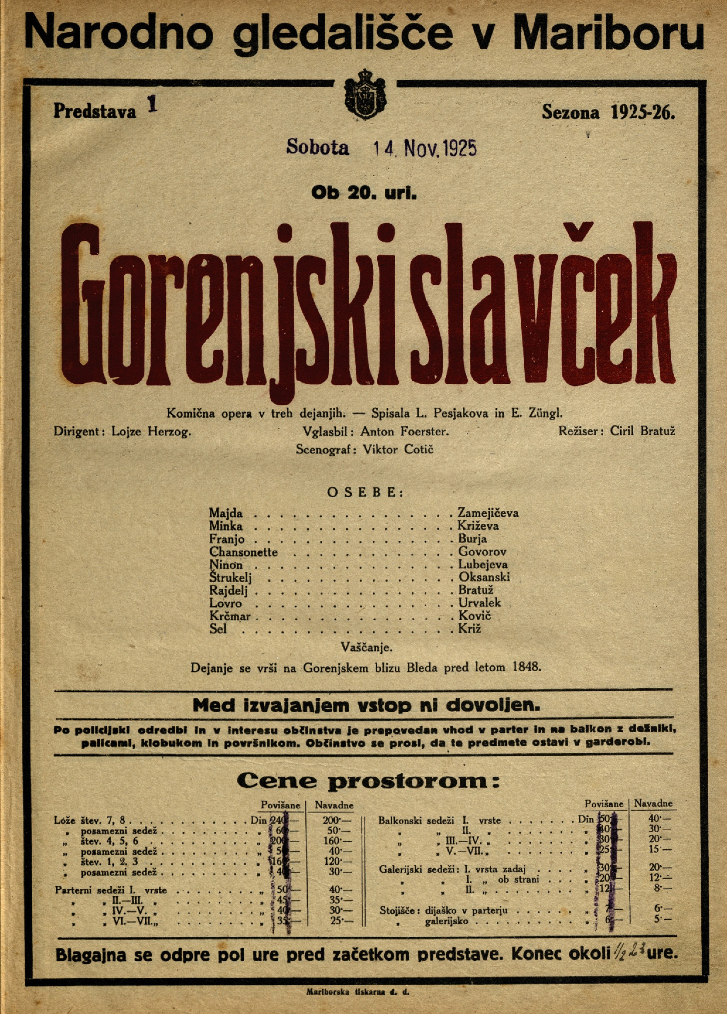 Plakat za predstavo Gorenjski slavček v Narodnem gledališču v Mariboru.